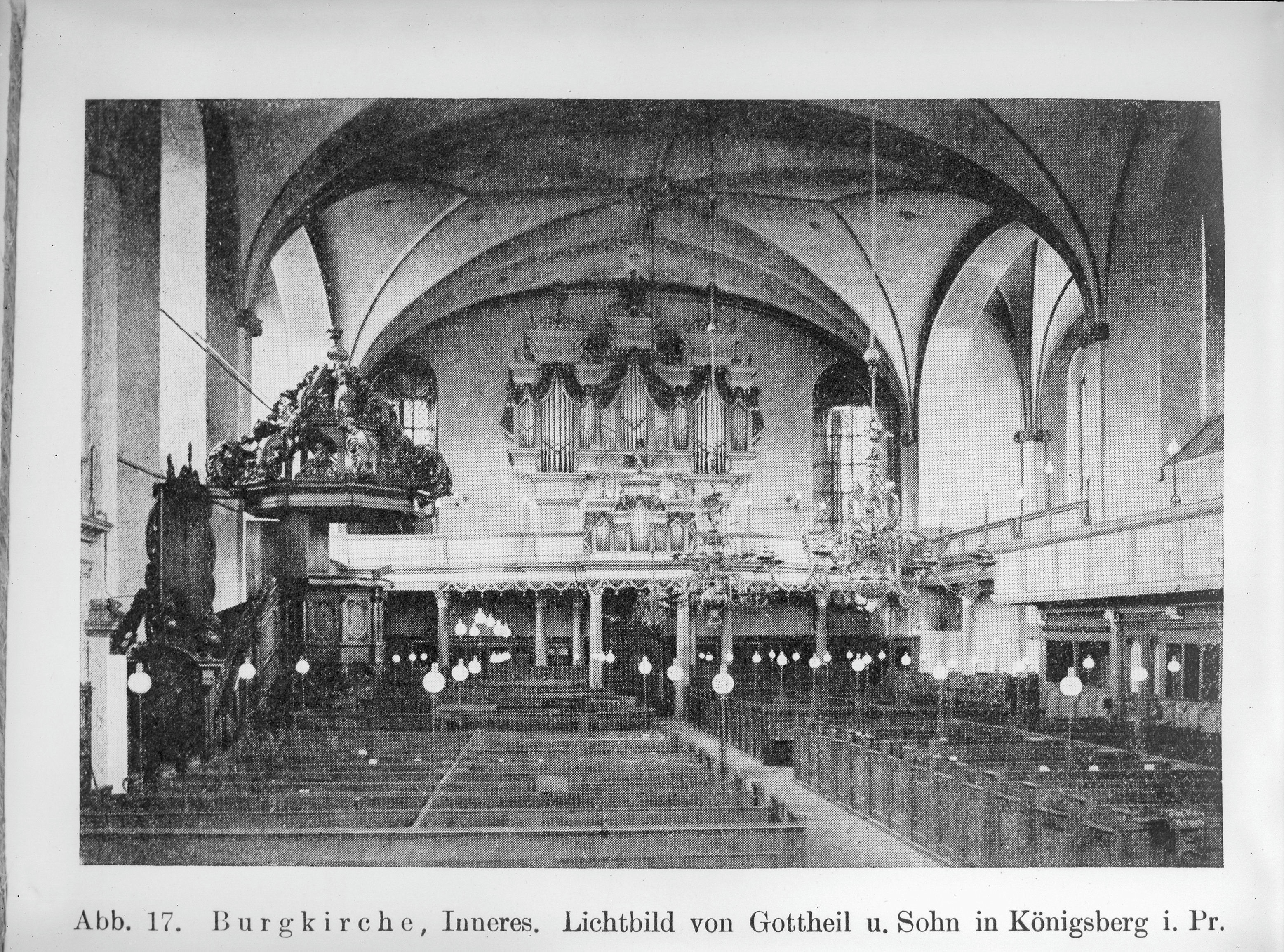 Burchkirche: Reproductie van foto uit boek, met interieur van kerk (opmerking: Pruissen. Afkomstig uit dissertatie van G. Fritsch: Die Burchkirche zu Königsberg in Preussen und Ihre Beziehungen zu Holland, 1929/1930.)